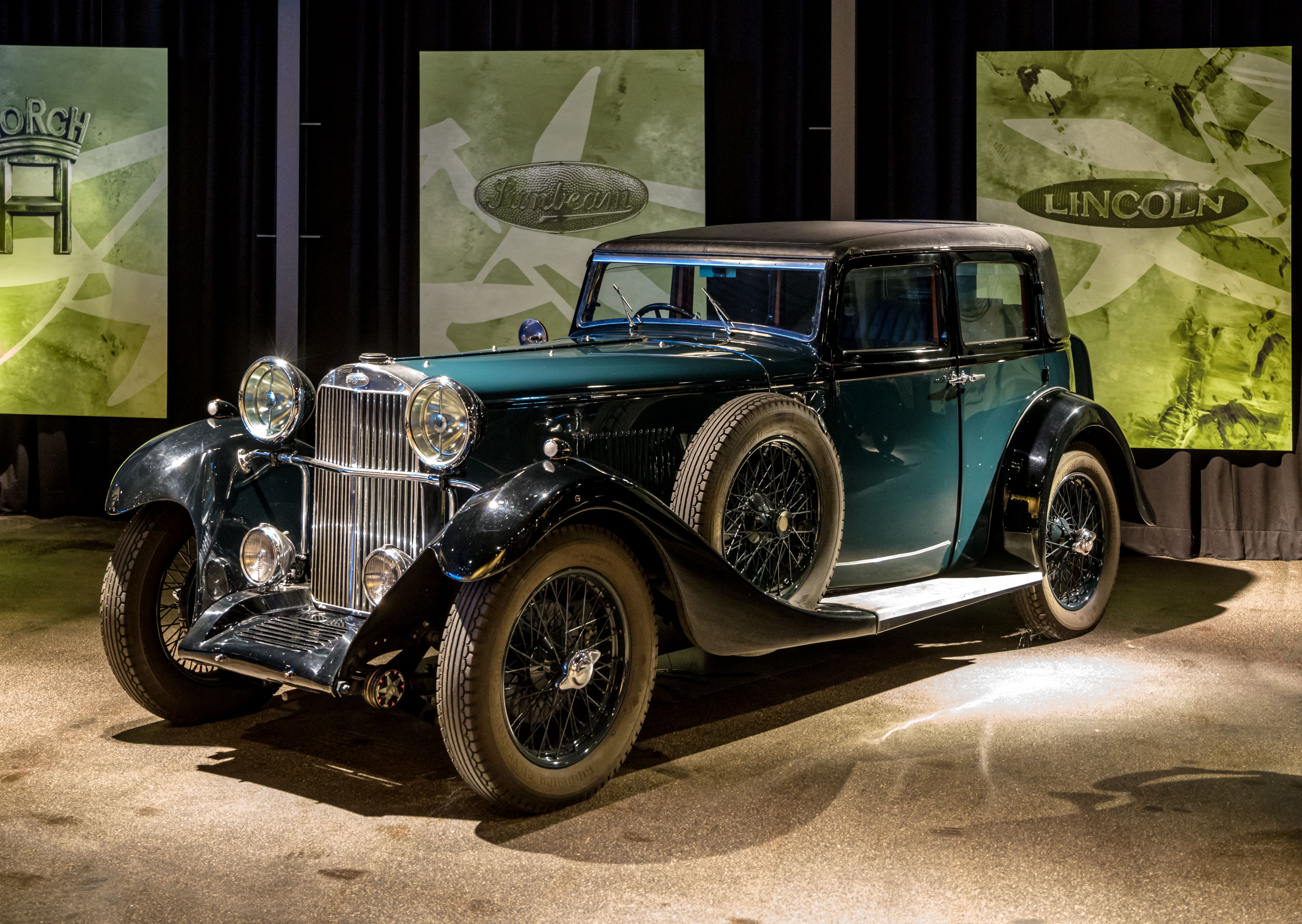 Das Volante Oldtimermuseum in Kirchzarten